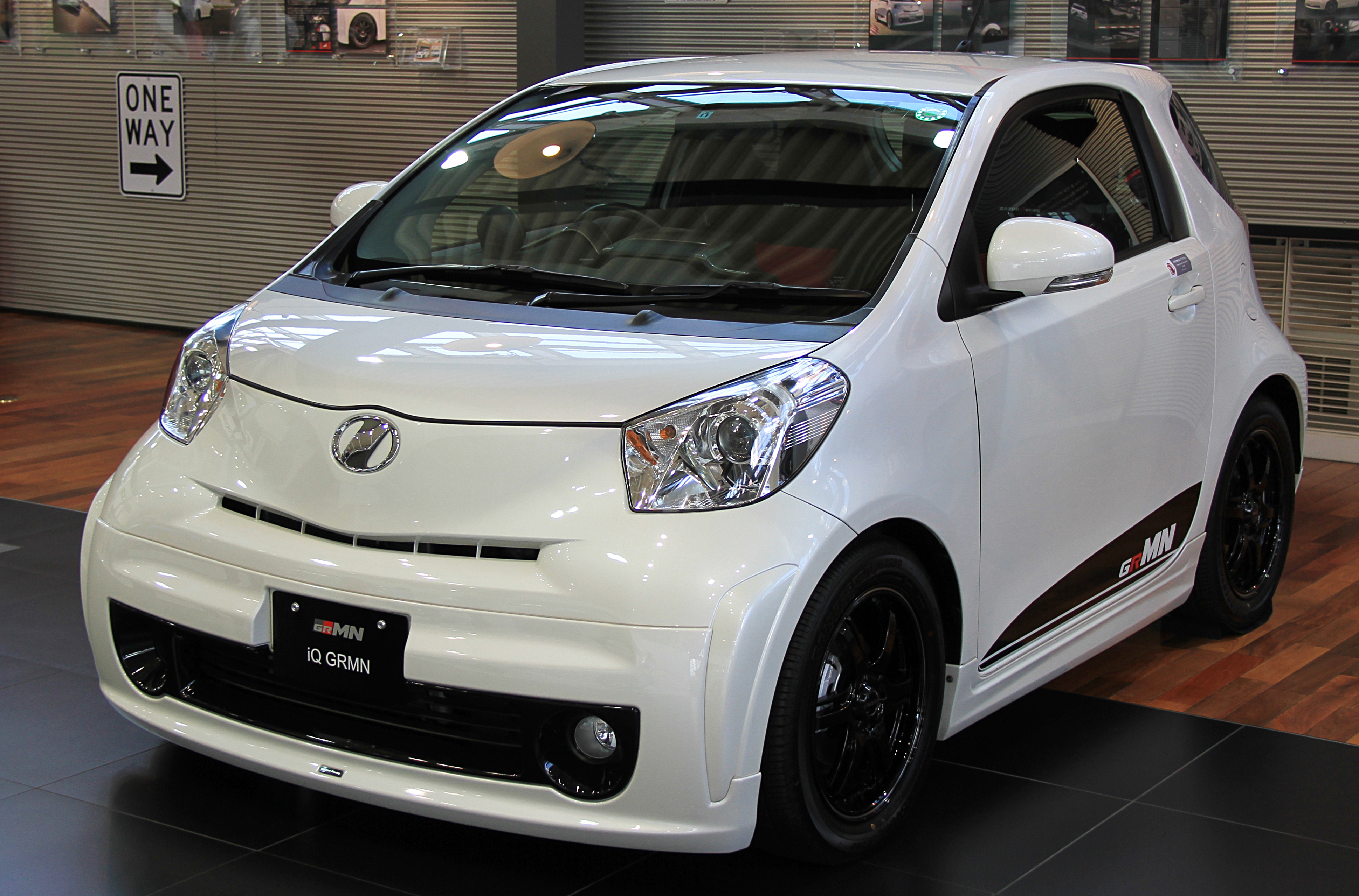 Toyota iQ